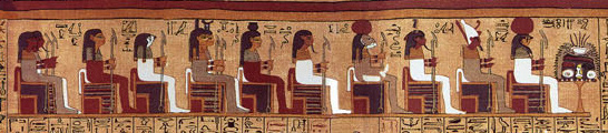 Détail d'une partie du Papyrus d'Ani, British Museum